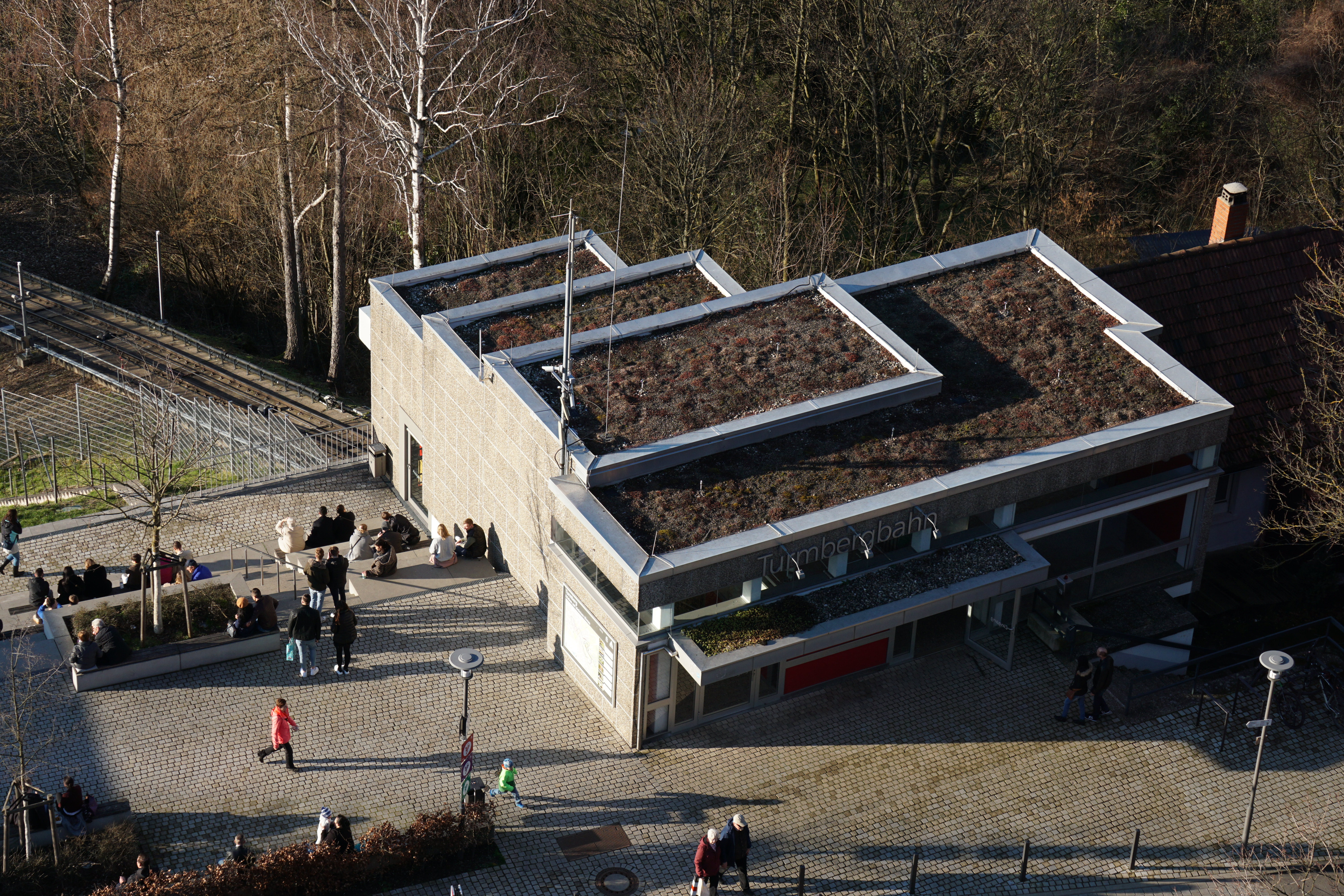 Bergstation der Turmbergbahn in Karlsruhe-Durlach